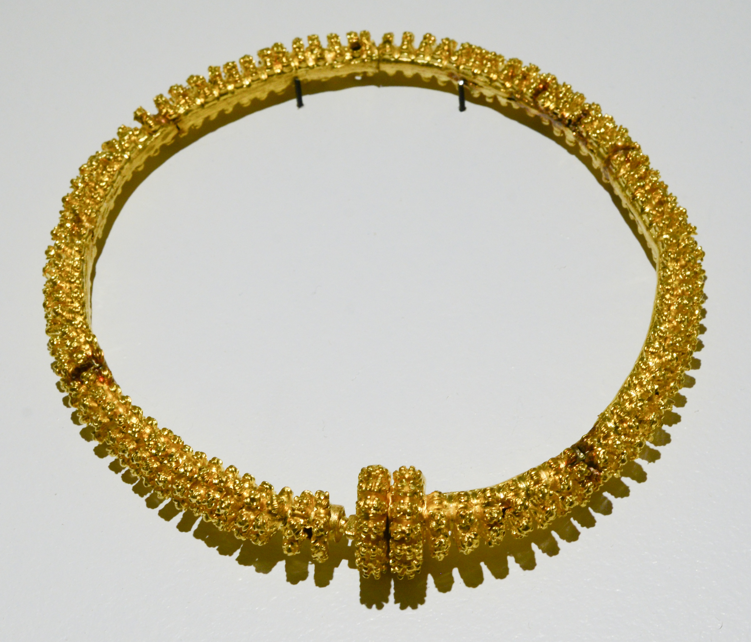 Torque celtico, inizio II sec. a.C.